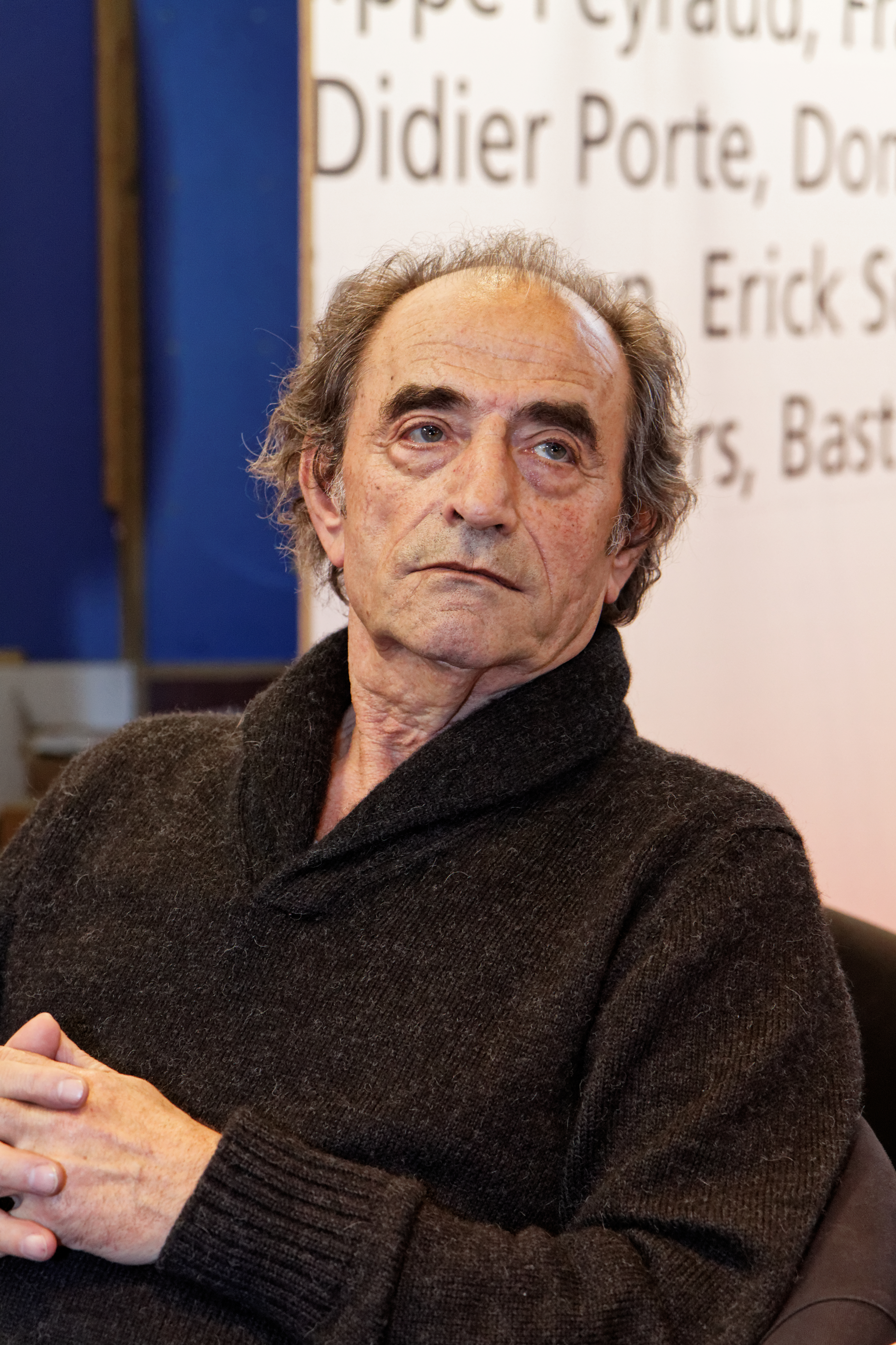 Richard Bohringer en dédicace lors du salon du livre 2012.